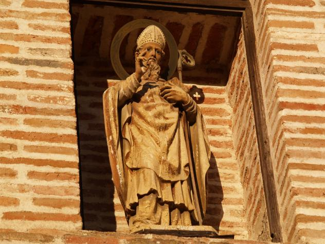 Imagen de San Martin Obispo situada en la puerta de la iglesia